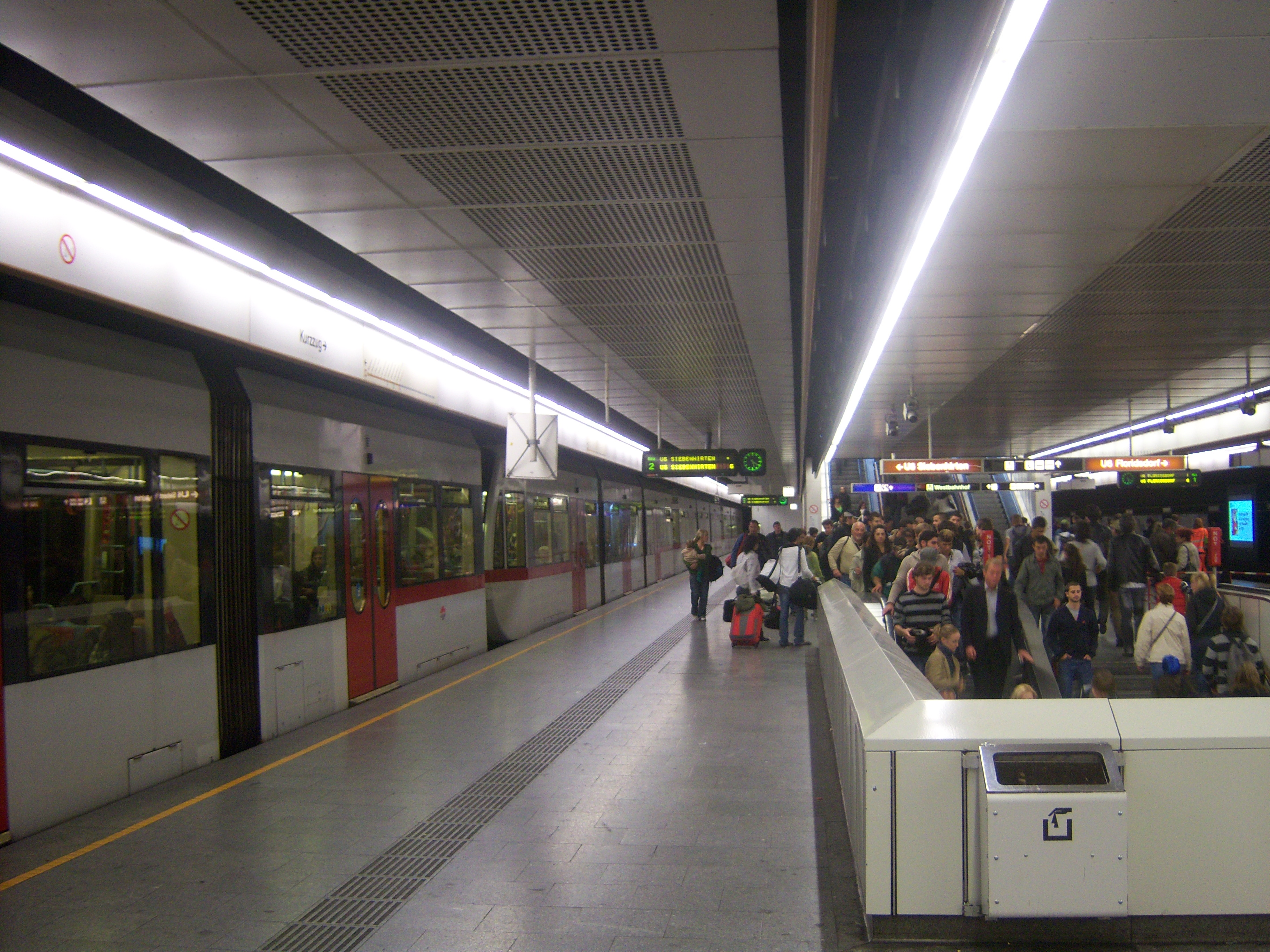 U6-Station Westbahnhof